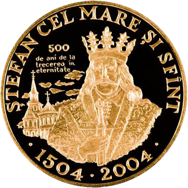 Аверс памятной монеты "500 лет со дня смерти Стефана III Великого"